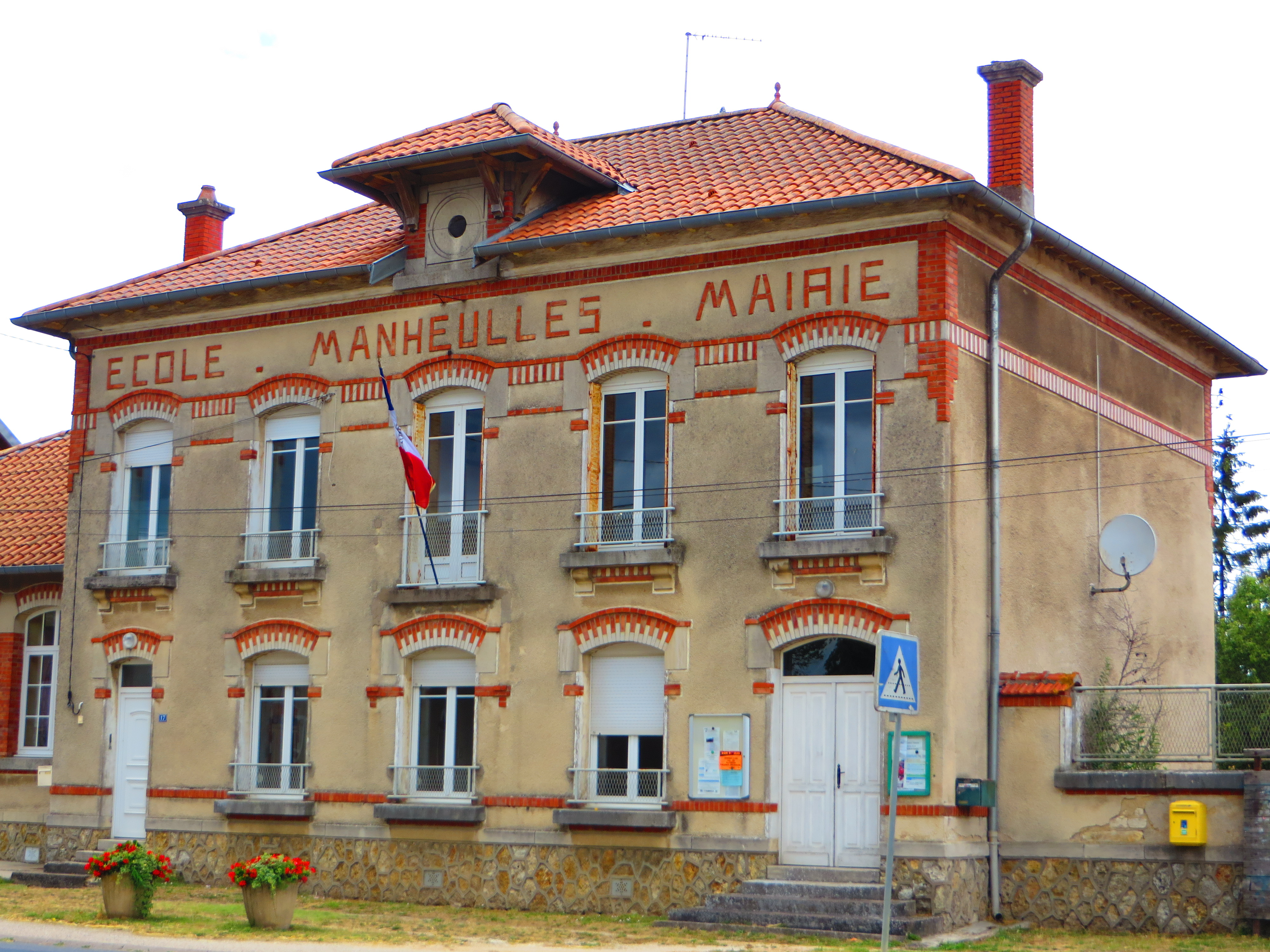 Manheulles La mairie